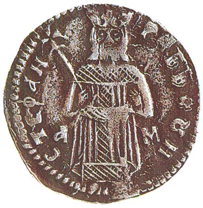 Serbian dinar - time of King Dragutin/Dinar serbe du temps du roi Dragutin (XIVe siècle)